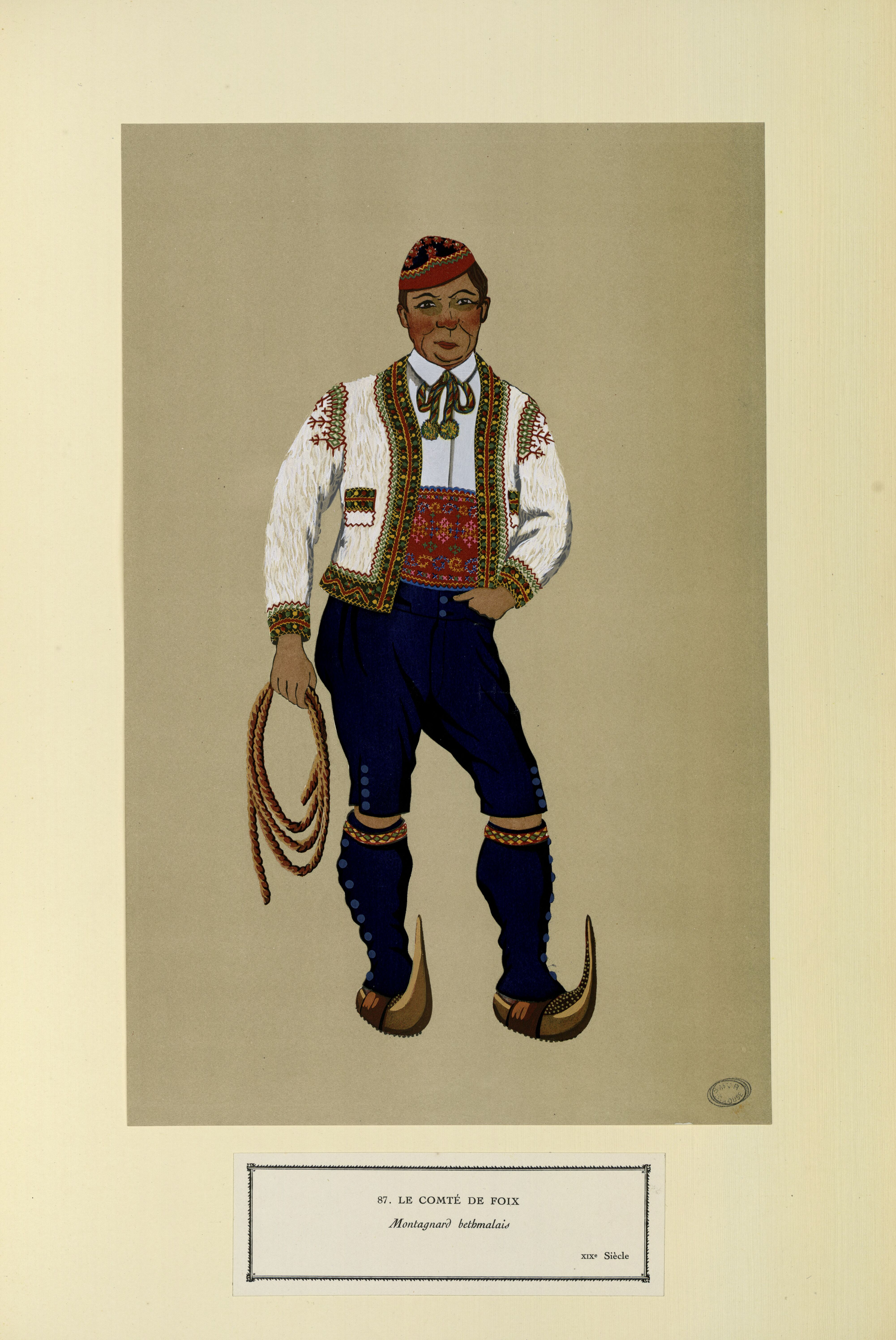 Montagnard bethmalais - XIXe siècle